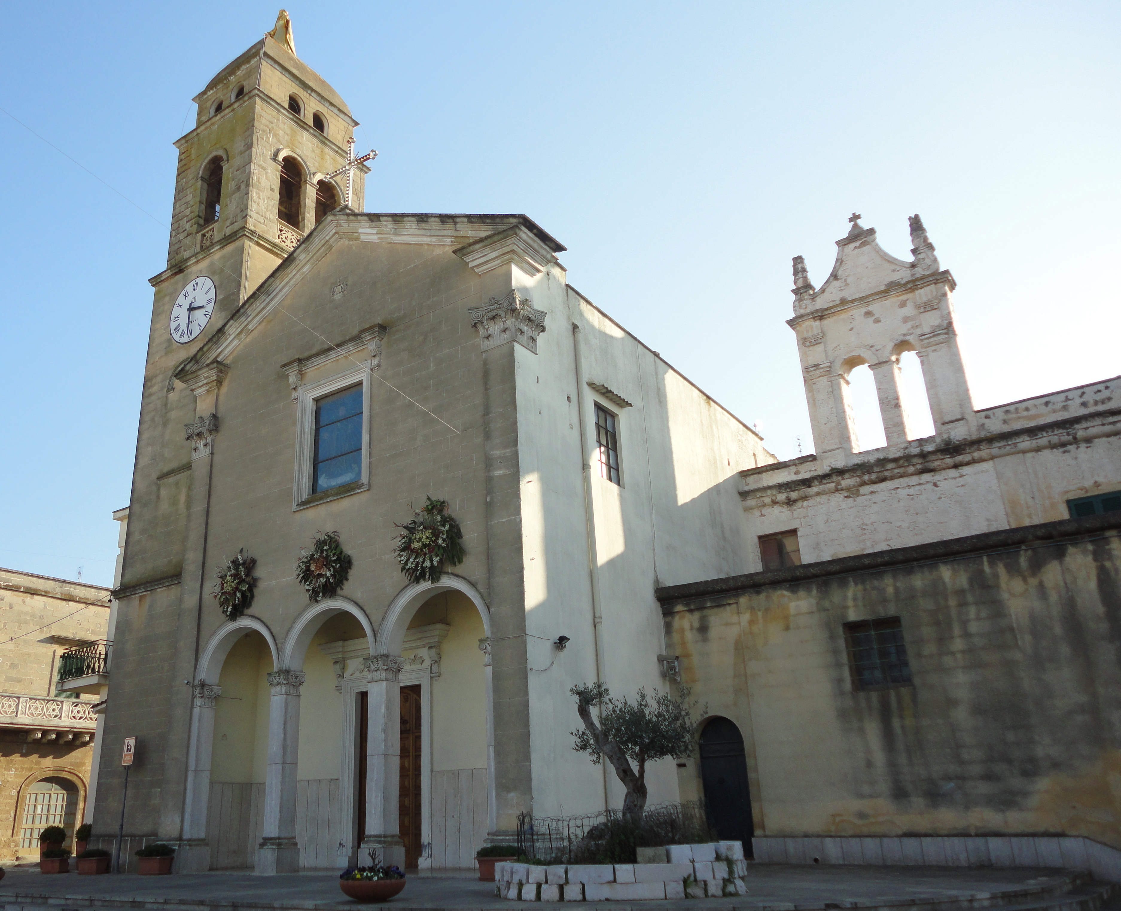 Chiesa Addolorata Taviano, Lecce